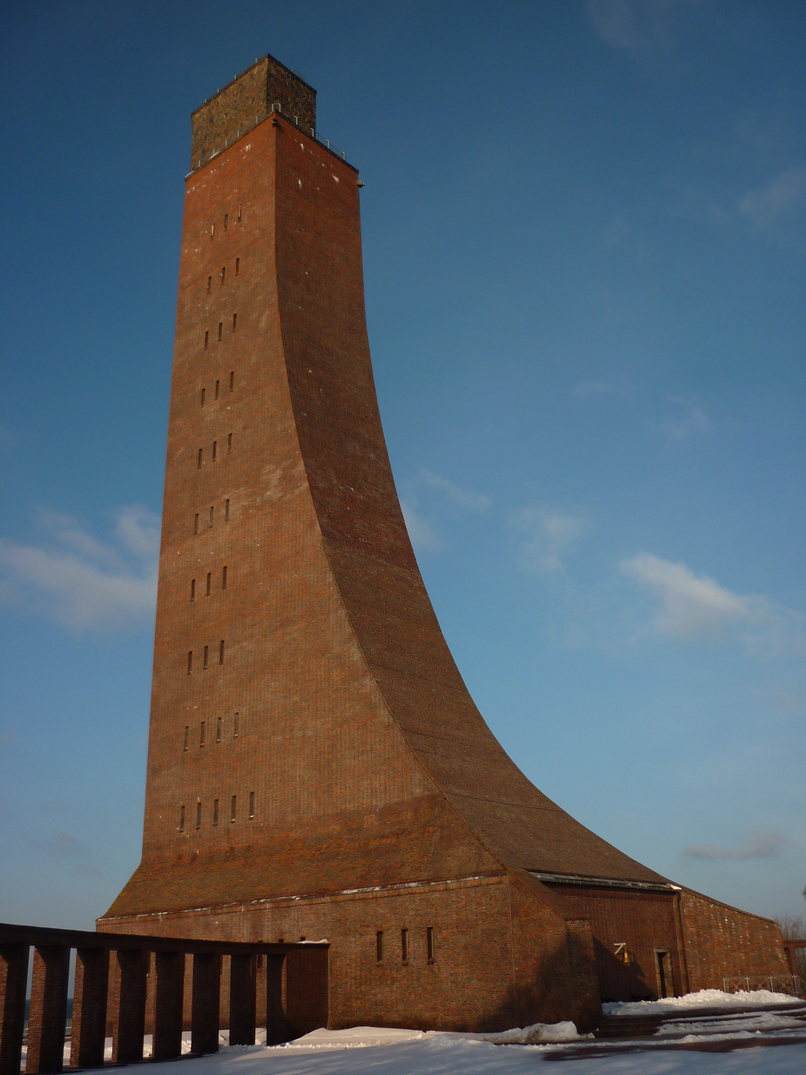 Der 72 Meter hohe Turm, in Form eines Segels, vom Innenhof aus gesehen.